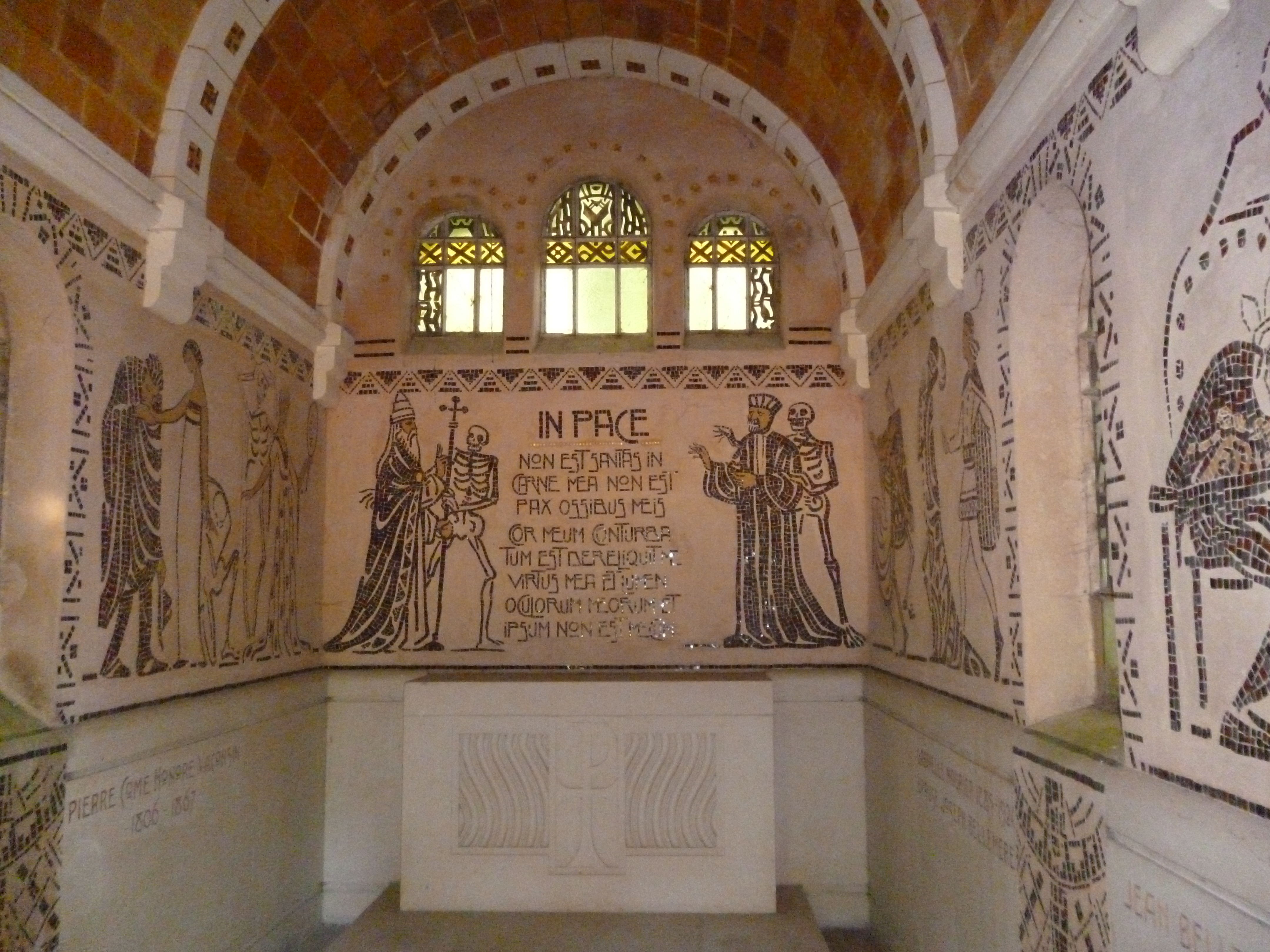 Chapelle funéraire de la famille Bellemère, connue aussi sous le nom de Chapelle de Chepoix, située à Chepoix (Oise, Picardie), classée en 2011